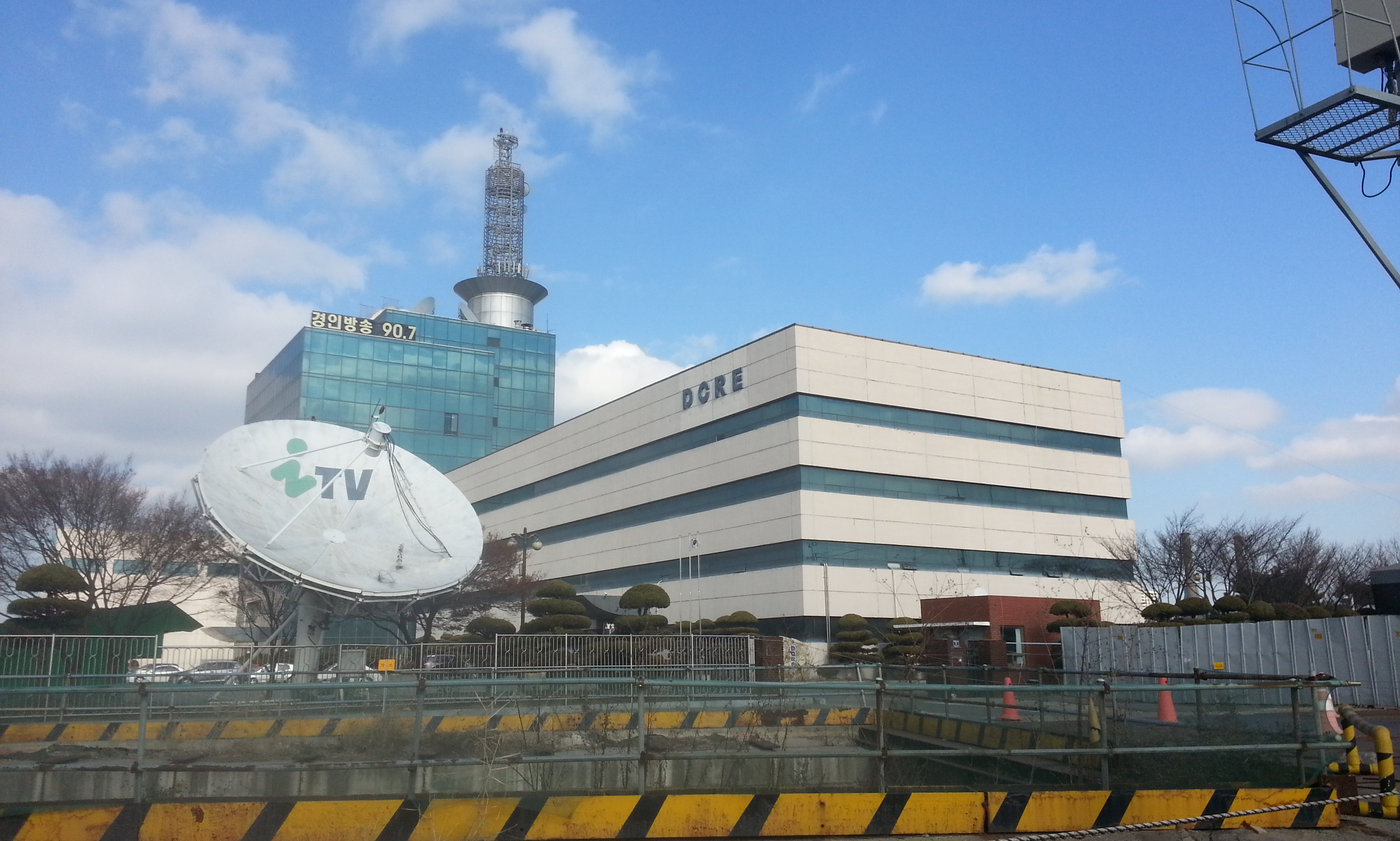 iTV 경인방송 사옥 (2016년 1월)